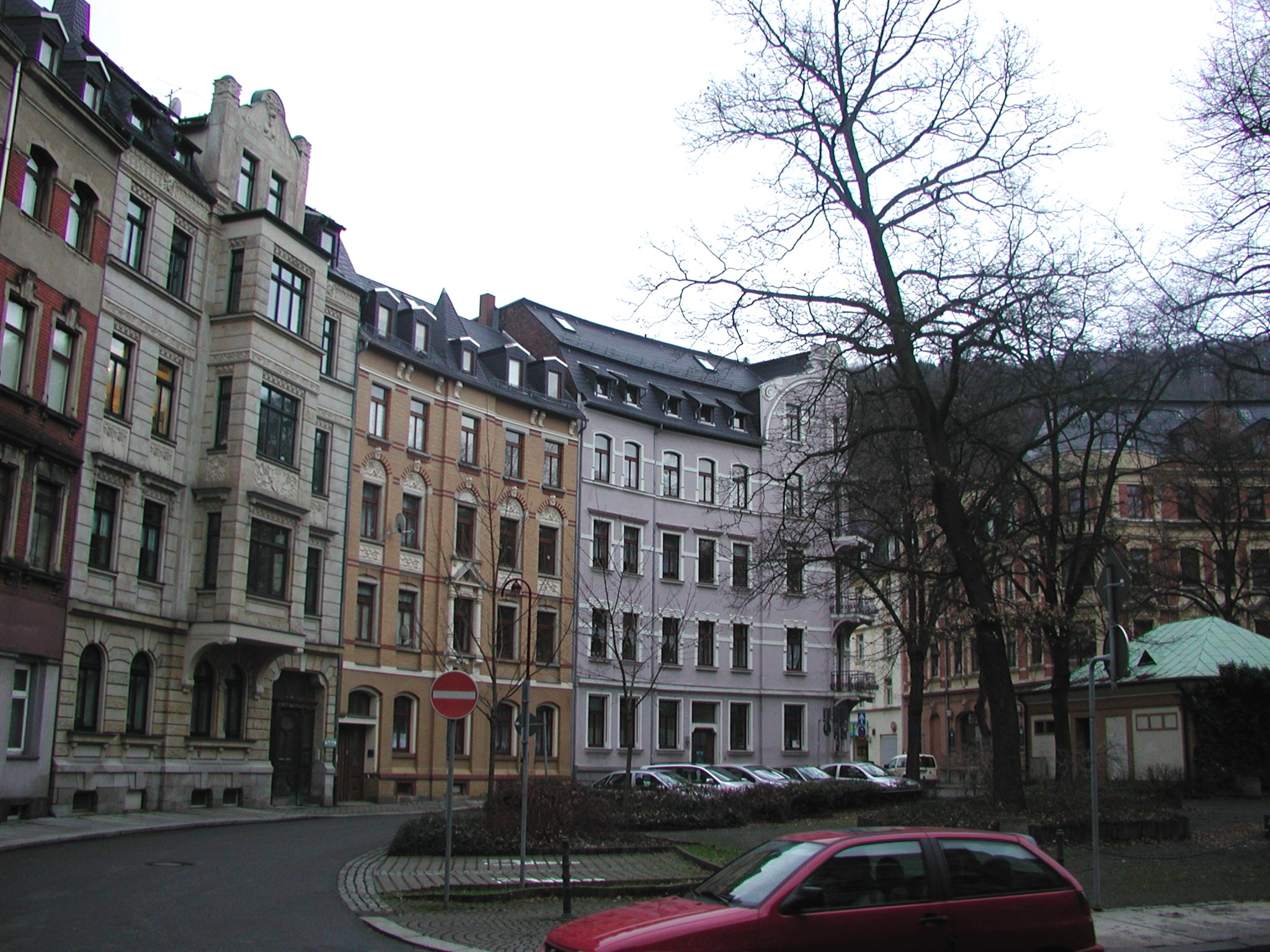 Wettiner Platz, linke Seite, Hausnummern 2, 3, und 4: Baudenkmale (Objektnummern 08957338, 08957337, 08957336